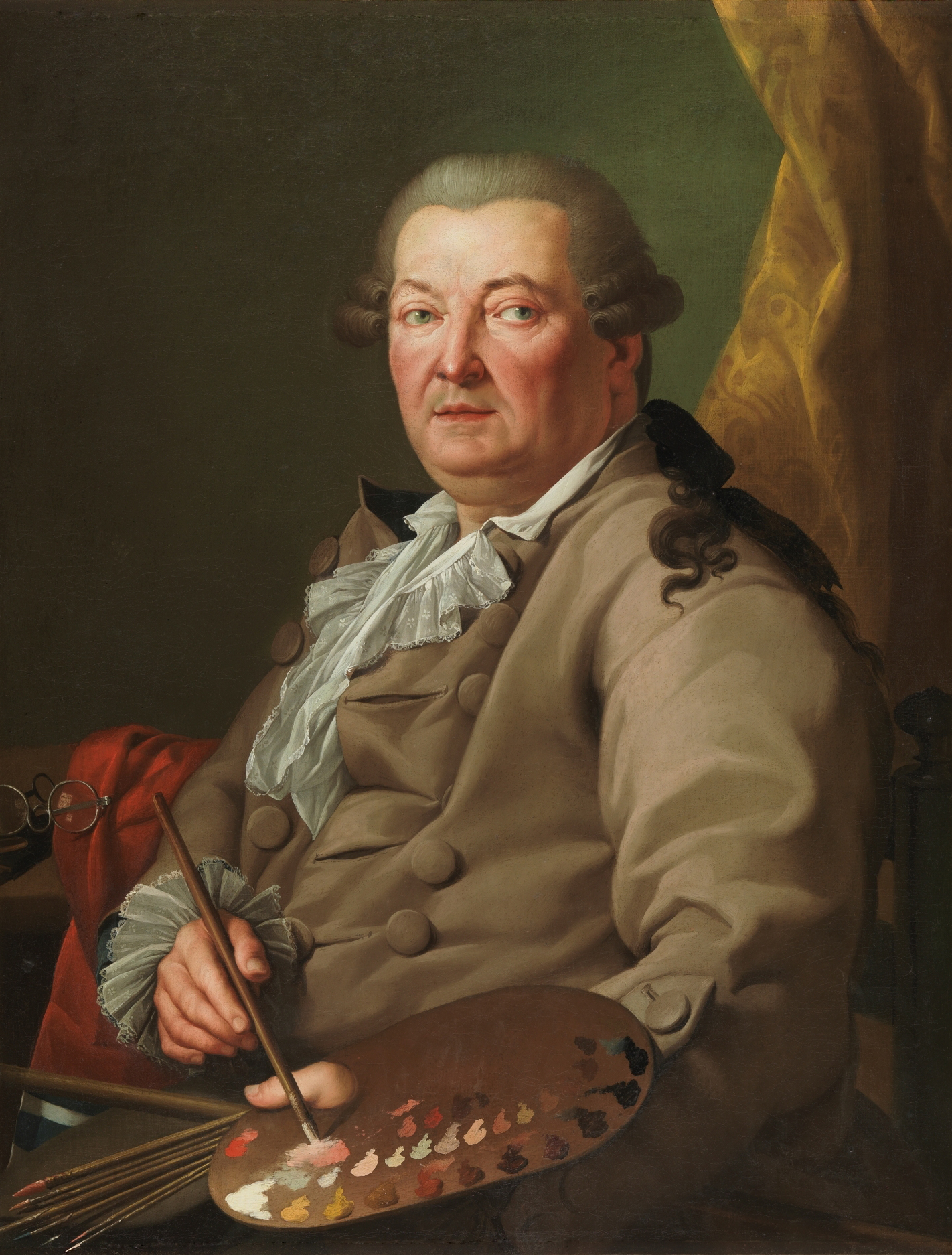 Retrato del pintor español Antonio González Velázquez (1723-1793). El retratado aparece de medio cuerpo, con la paleta y los pinceles en las manos, sentado en una silla tosca, junto a una mesa en la que se aprecian distintos objetos, entre ellos sus lentes. Posee una figura corpulenta, ostenta peluca, con lazo y coleta que caen por la espalda y el hombro izquierdo, sobre una cabeza grande y rostro de facciones anchas y notable papada. Viste una amplia casaca, con camisa abierta ribeteada de encajes que combinan con los de los puños. El cromatismo es rico y diversificado, armonizando el del atuendo con la cortina adamascada amarilla, que enriquece la composición. No existe ninguna tendencia a la idealización o a la autolisonja, ni tampoco se advierte el deseo de agradar a un supuesto espectador.